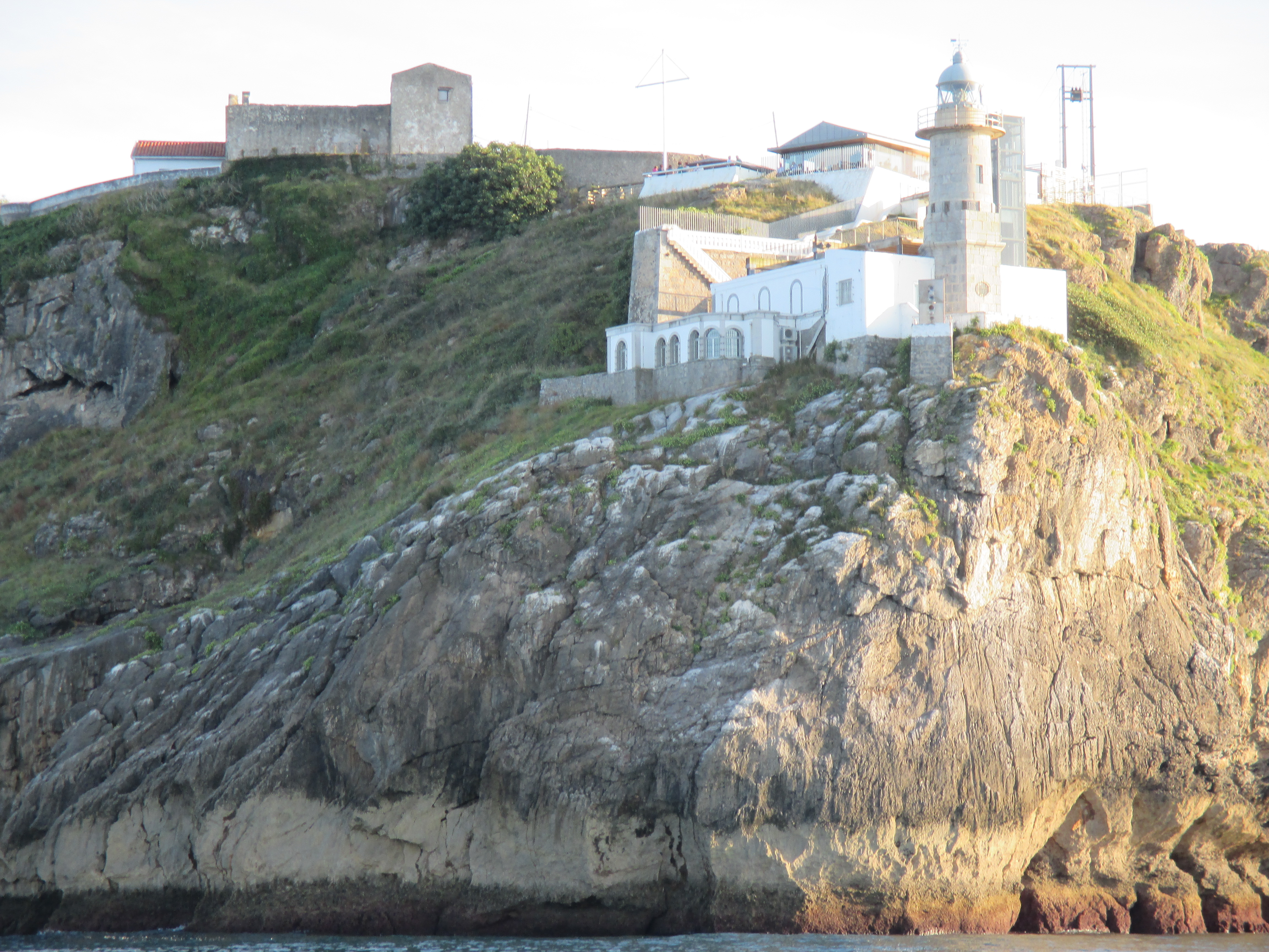 Antzoriz II eta IV kobazuloak; Santa Katalina baseliza; eta Lekeitioko itsasargia.